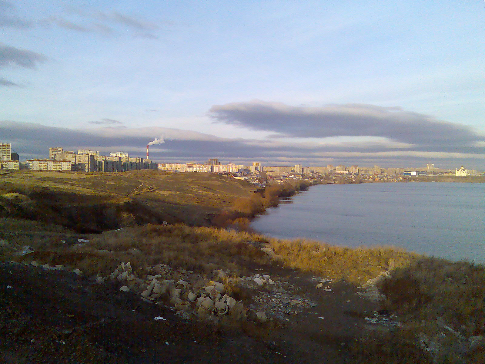 Вид с Кирпичного мыса